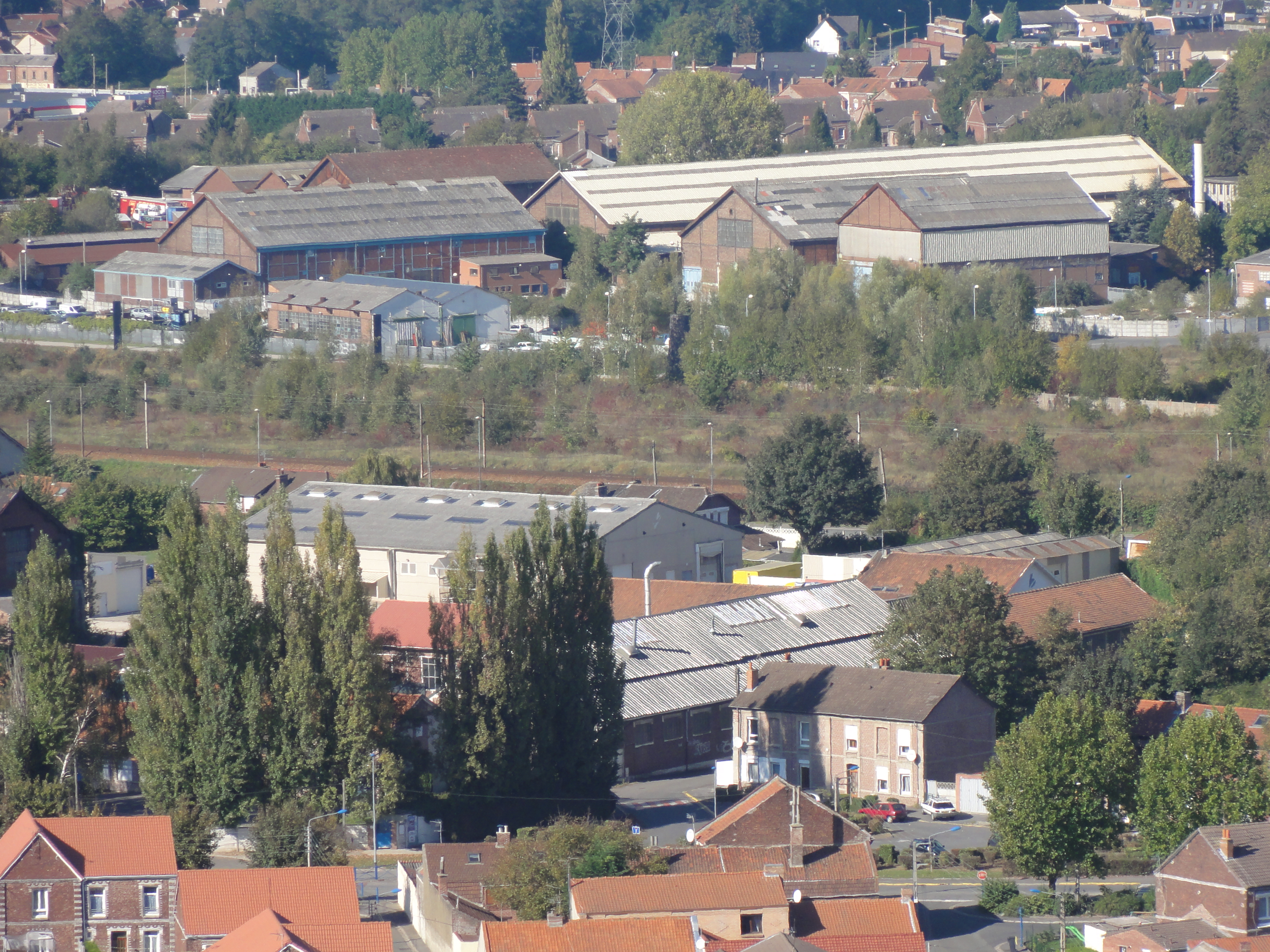 Ateliers centraux de la Compagnie des mines de Courrières, Billy-Montigny, Pas-de-Calais, Nord-Pas-de-Calais, France.